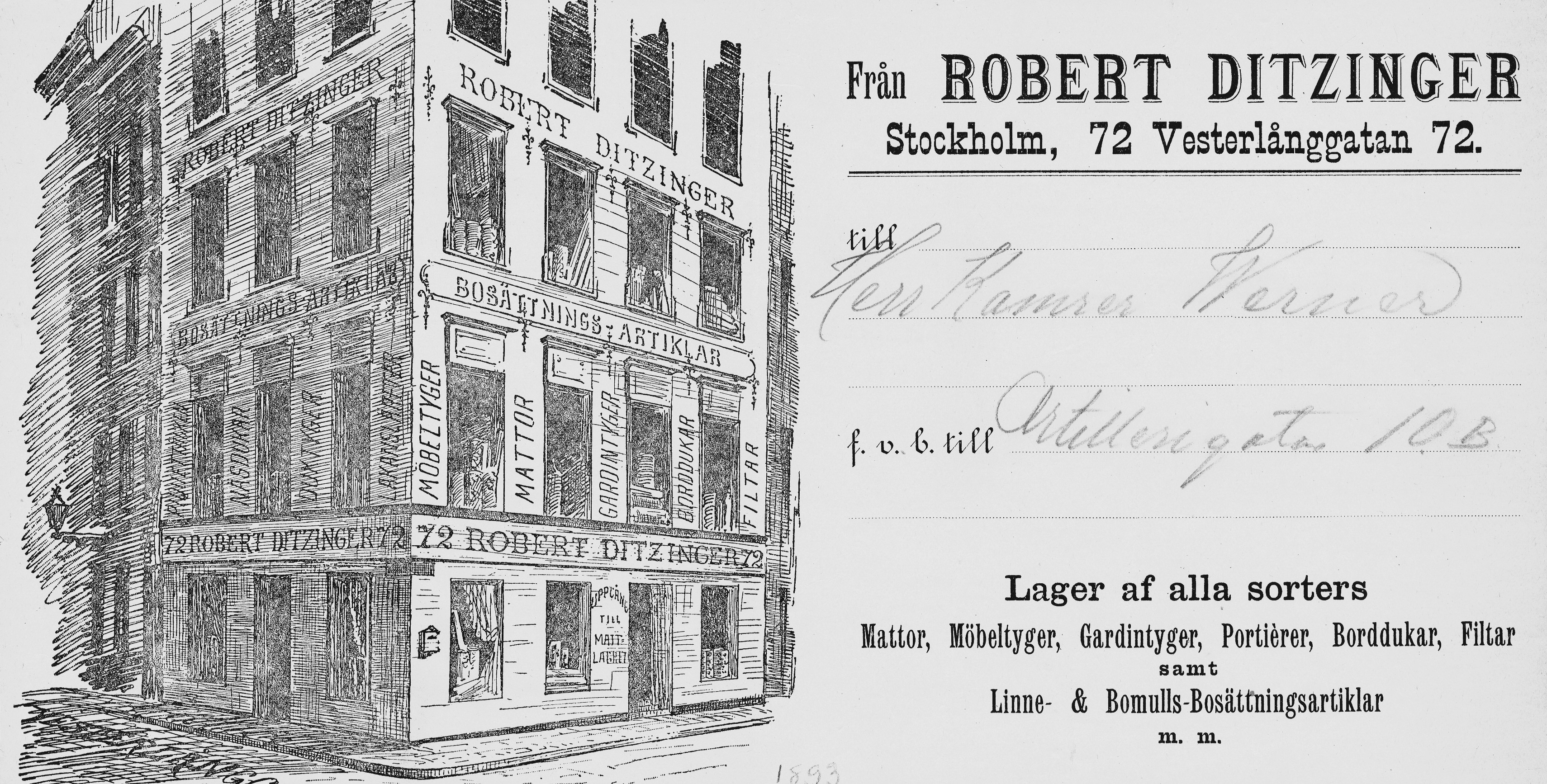 Robert Ditzingers inredningshus vid Västerlånggatan 72-74